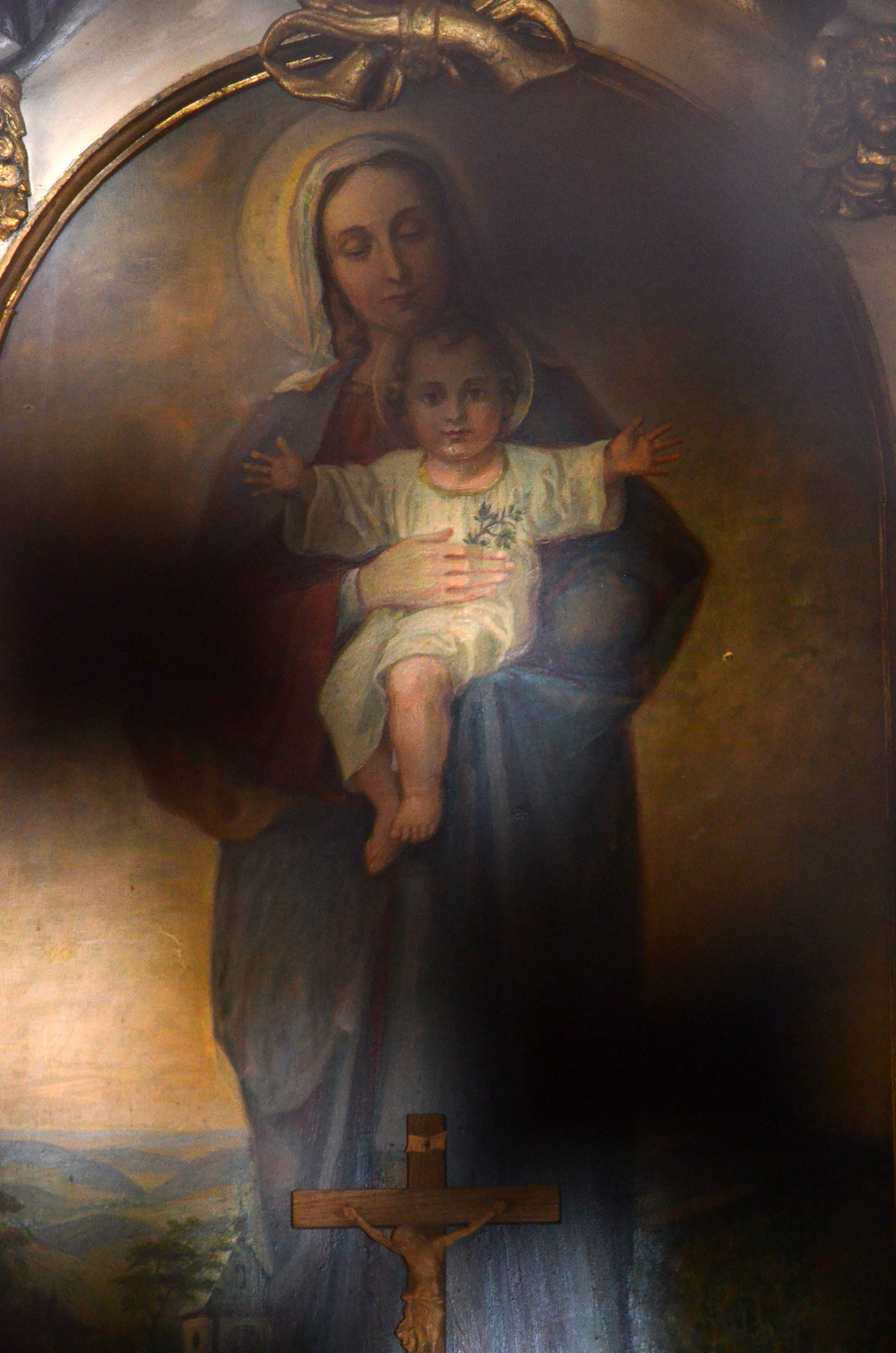 Die Kapelle wird in der Denkmalliste der Stadt Brilon unter 30. als Marienkapelle von 1920 geführt.